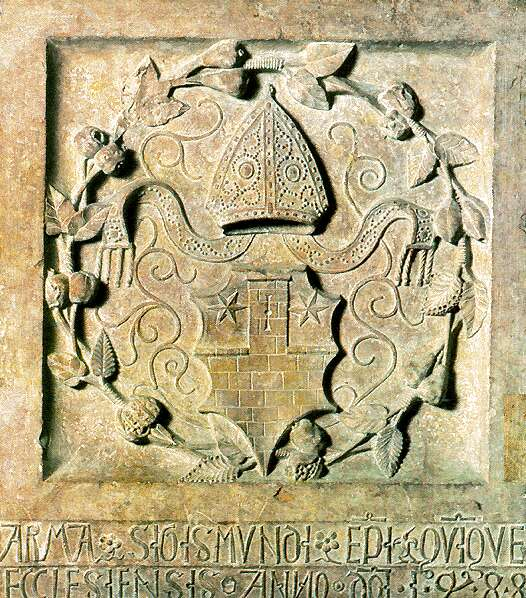 Ernuszt Zsigmond bíboros címere